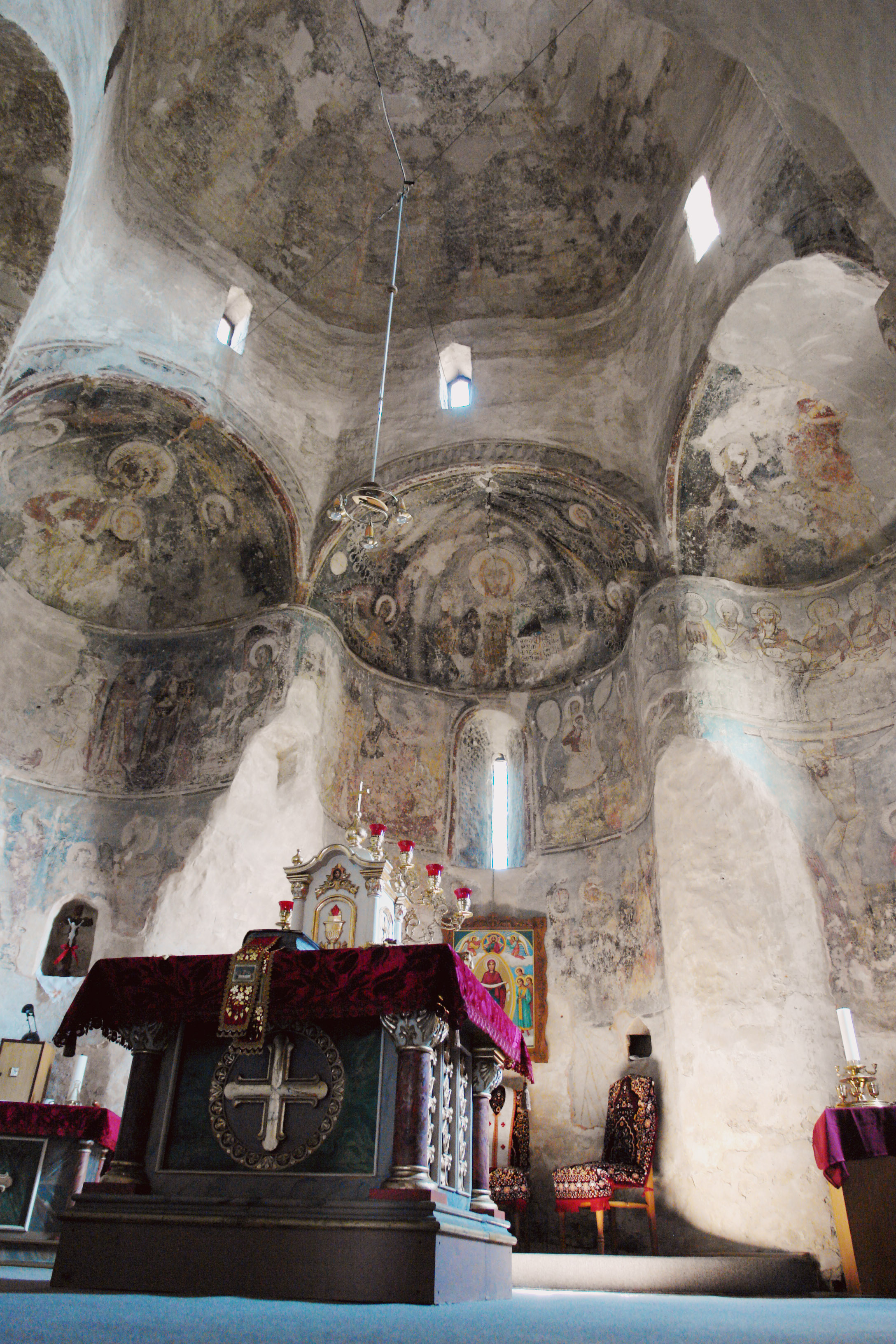 Gerényi templombelső